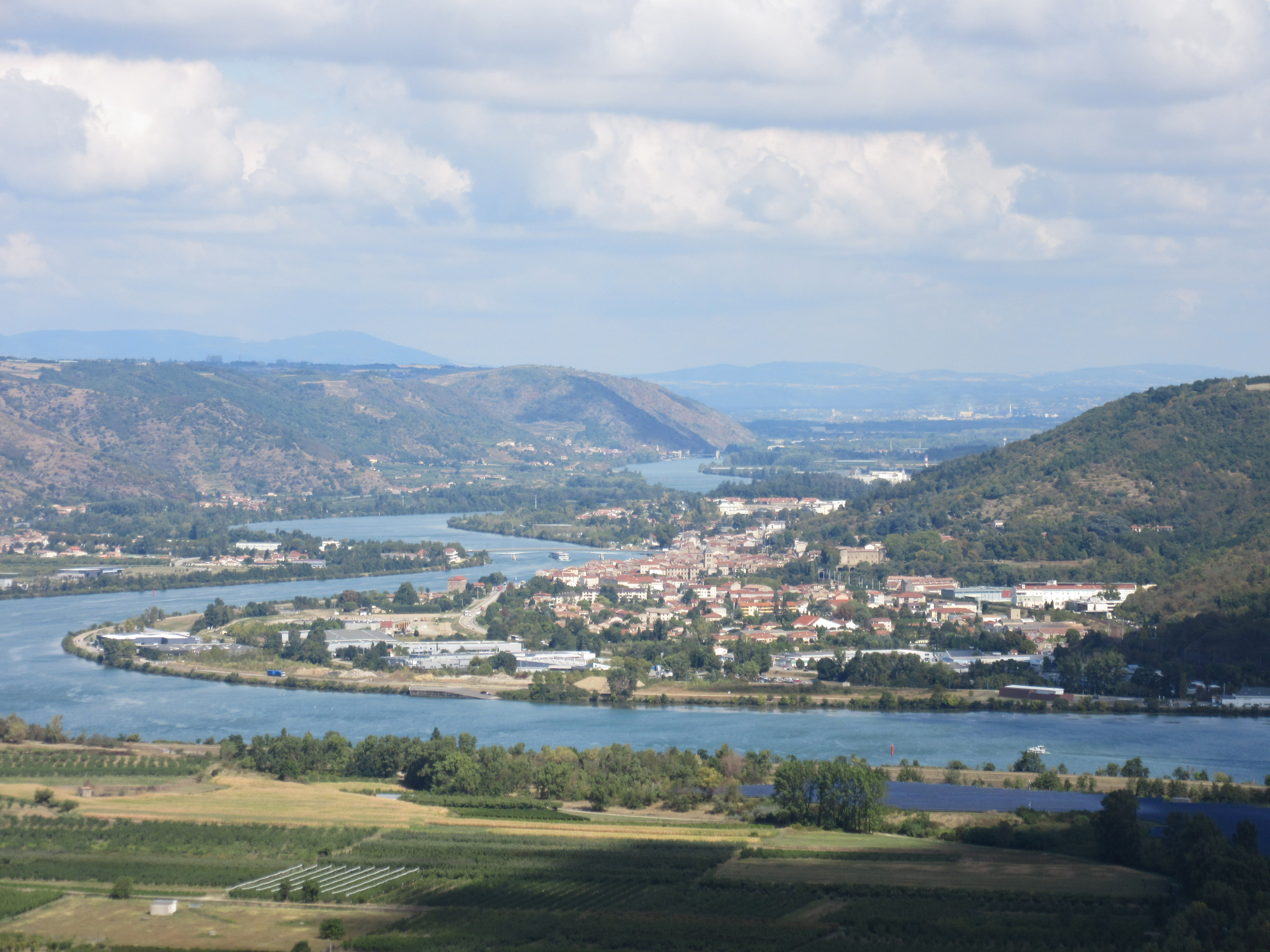 Saint-Vallier (Drôme) vu du puy de Serves. Le Rhône au niveau du défilé de Saint-Vallier, en direction d'Andance (deuxième pont). A l'arrière-plan, les derniers reliefs des monts du Pilat (mont Monnet, la Peaume).